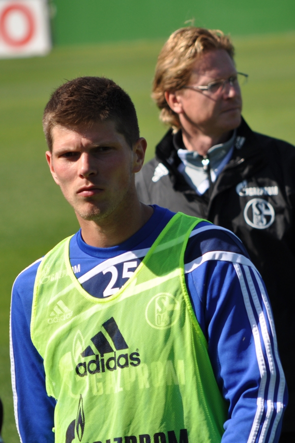 Klaas Jan Huntelaar beim Training